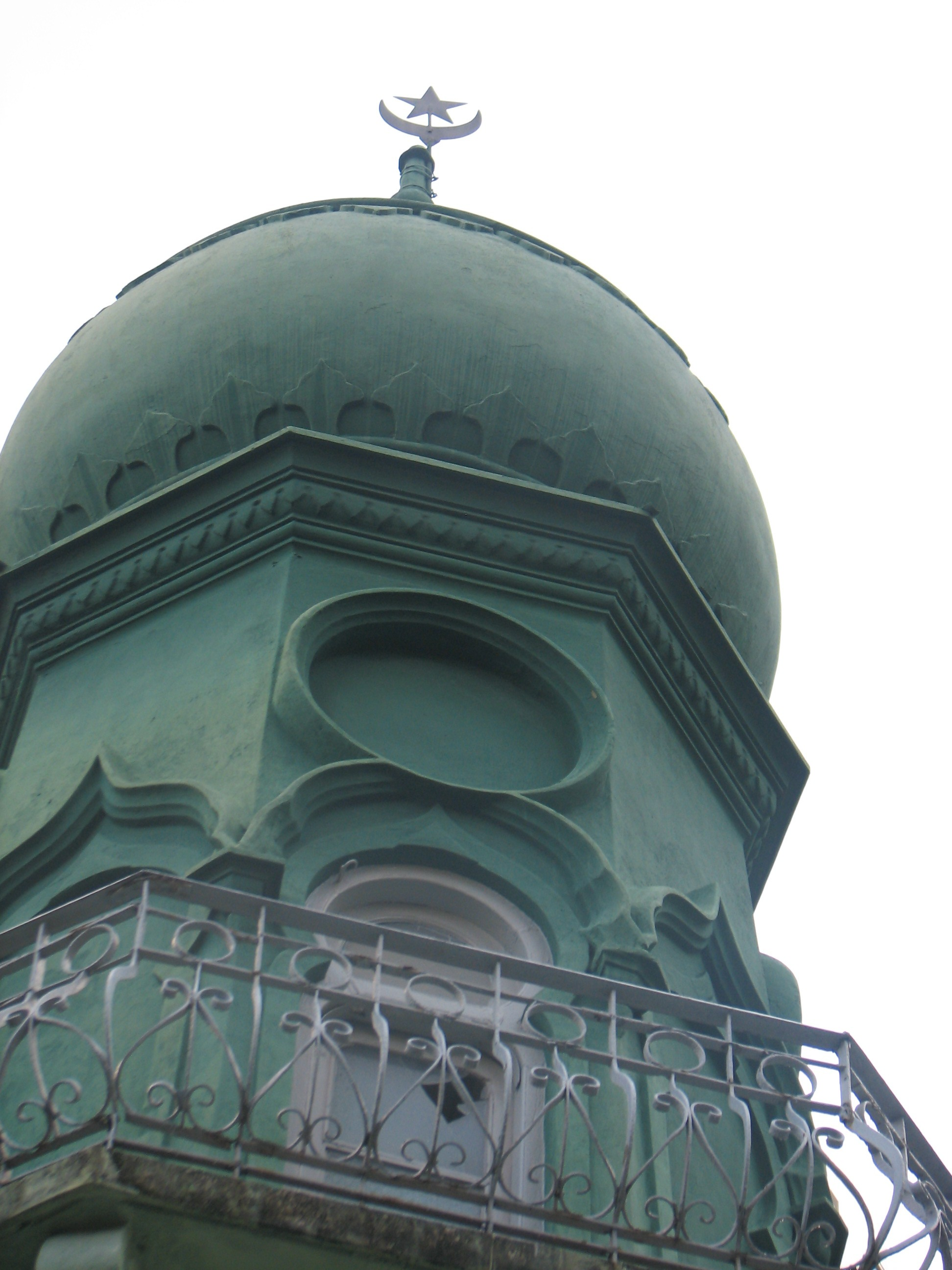 些利街清真寺